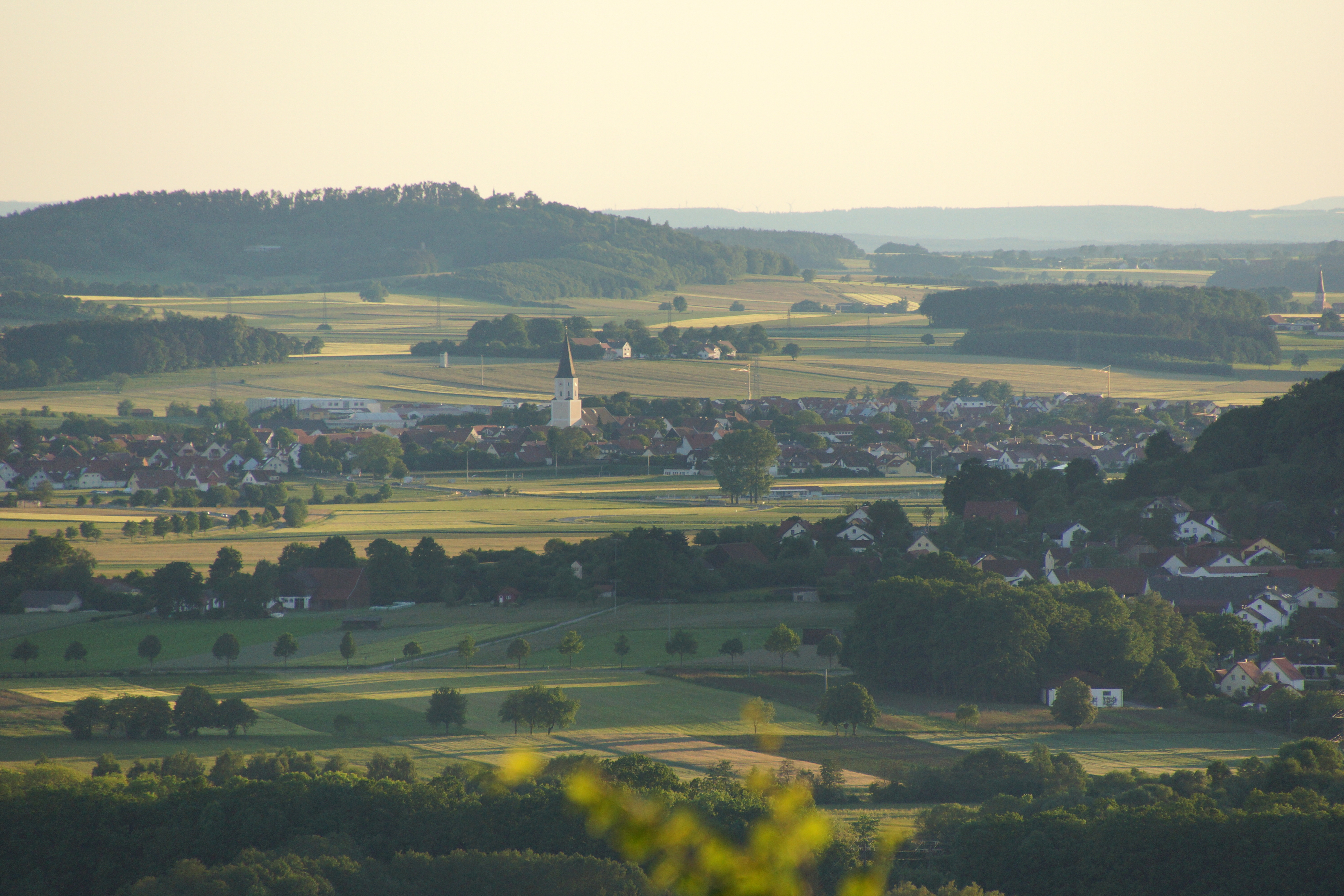 Blick vom Neumarkter Hausberg, dem Mariahilfberg